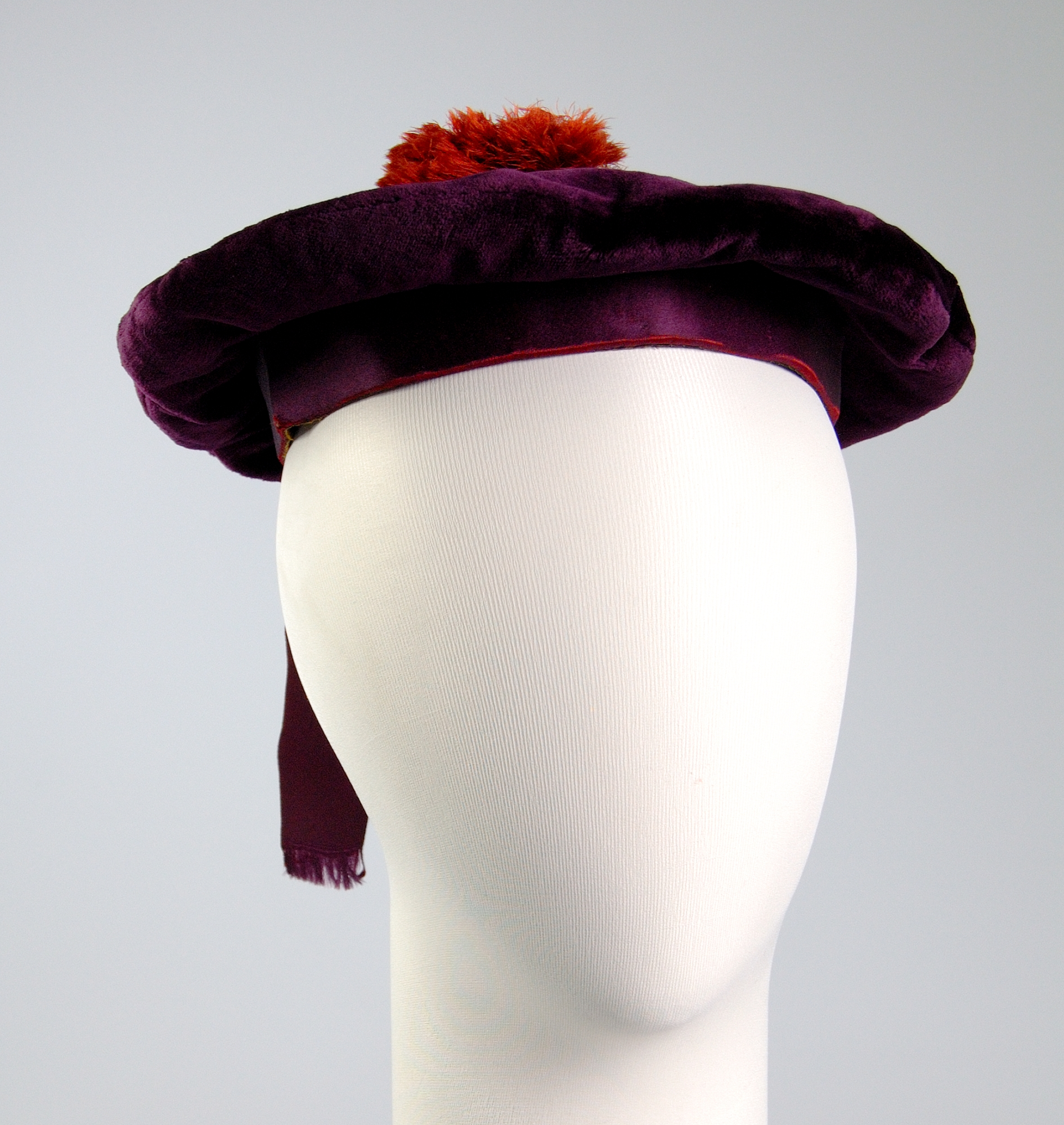 French; Beret